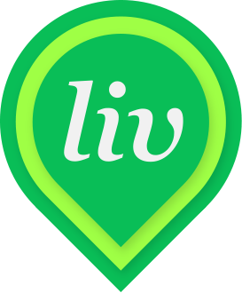 Livin logo